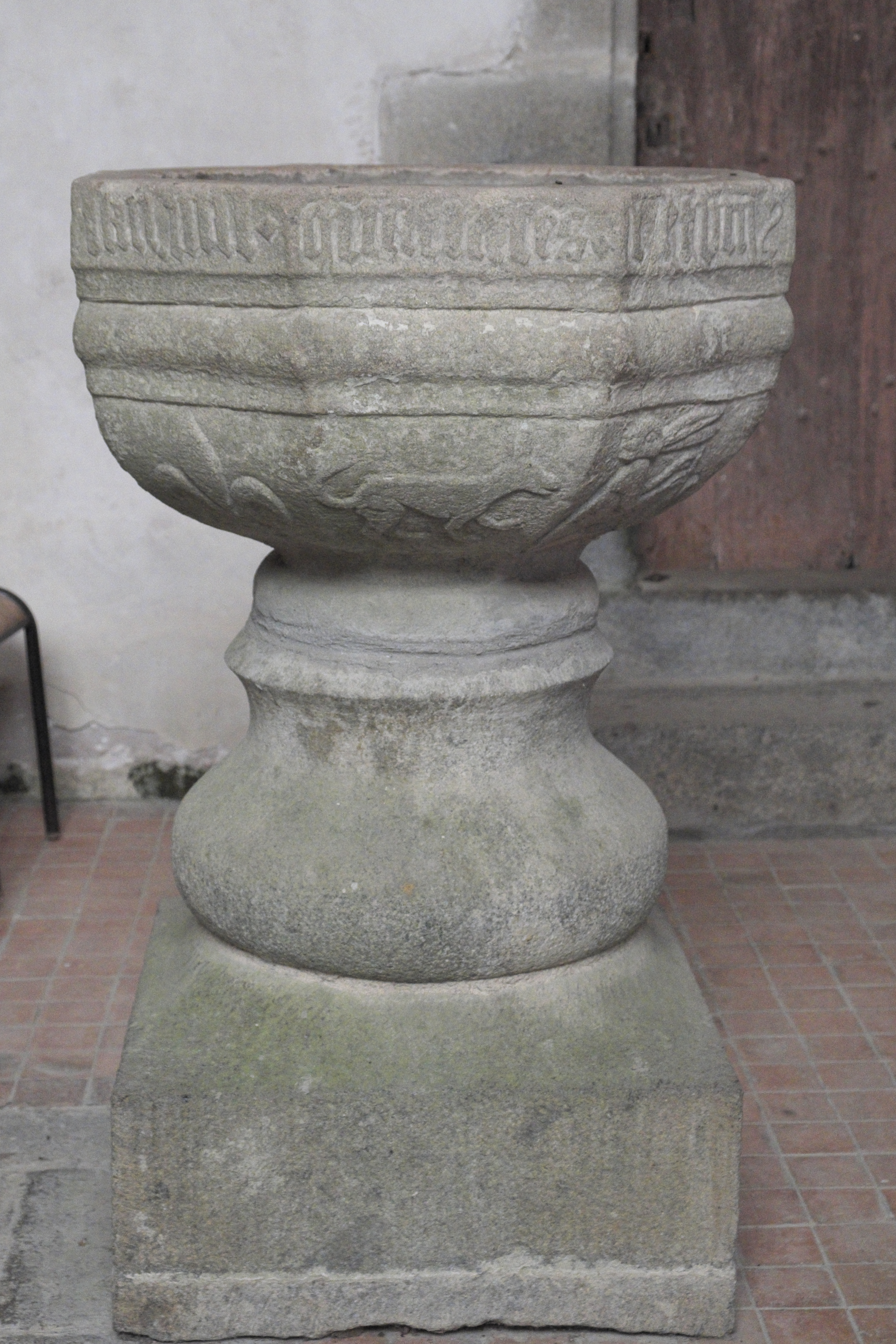 Katholische Pfarrkirche Saint-Ouen in Les Iffs im Département Ille-et-Vilaine (Region Bretagne/Frankreich), Taufbecken oder Weihwasserbecken